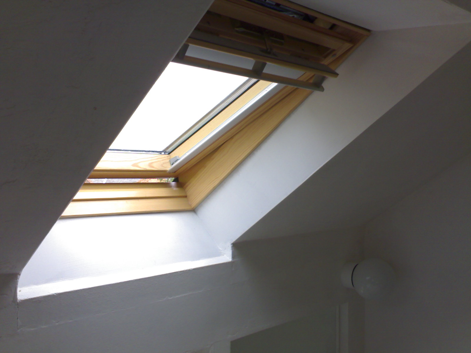 Velux roof window